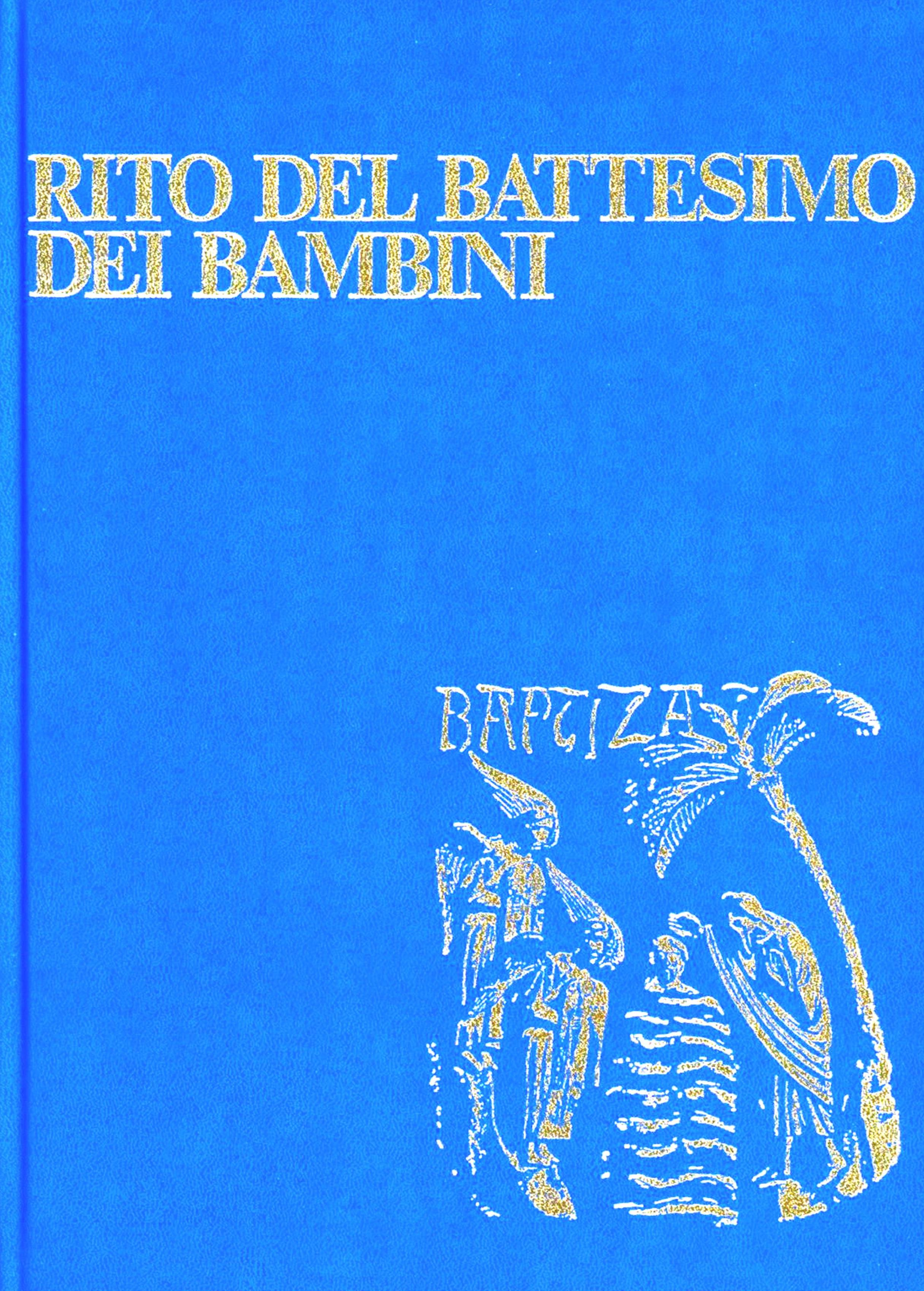 Frontespizio del Libro del Battesimo dei bambini